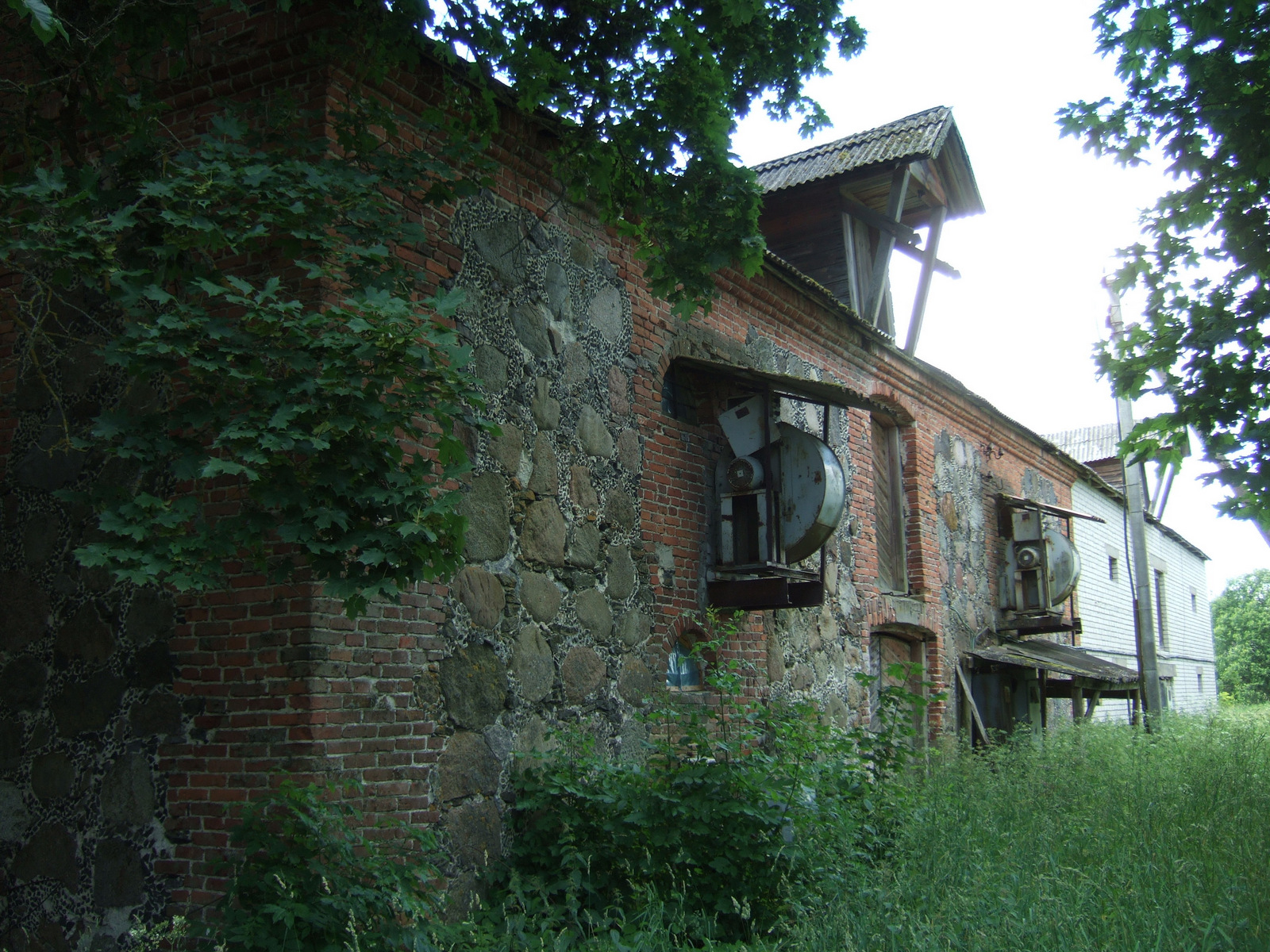 Čiulų sodybos svirnas